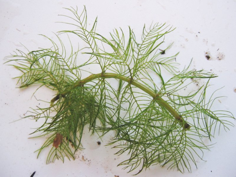 Quirl-Tausendblatt Myriophyllum verticillatum, Müritz-Gebiet